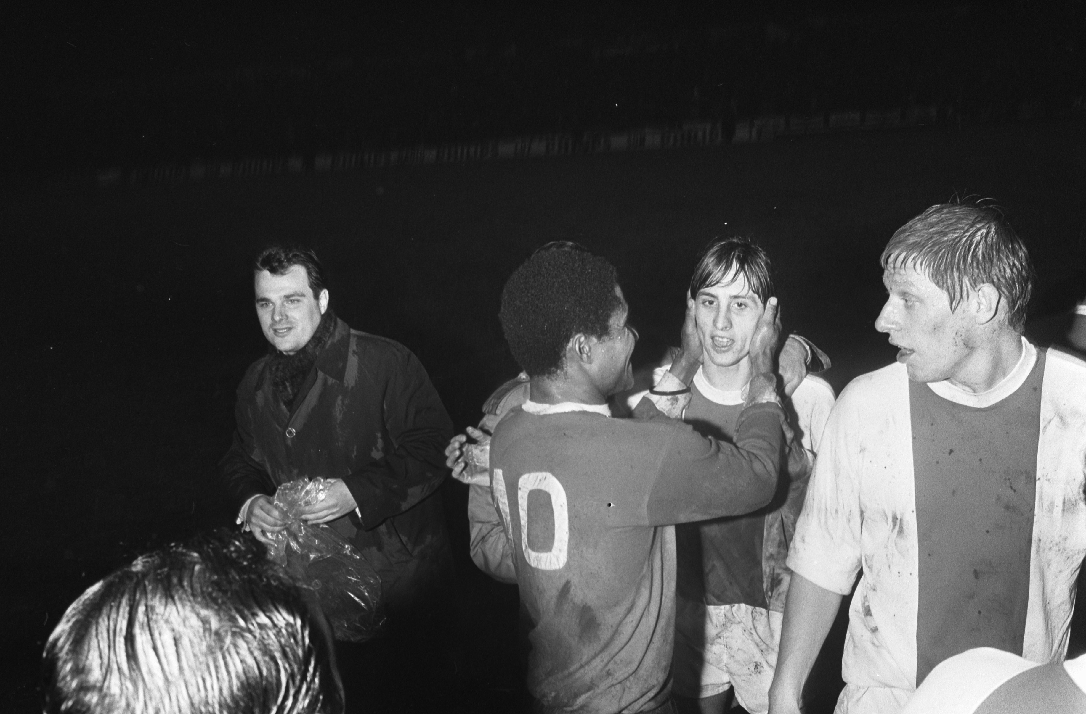 Benfica tegen Ajax 1-3 Eusebio (links) met handen om gezicht van Johan Cruyff om te feliciteren, na de wedstrijd. Rechts (omkijkend) Tonnie Pronk. Datum 19 februari 1969